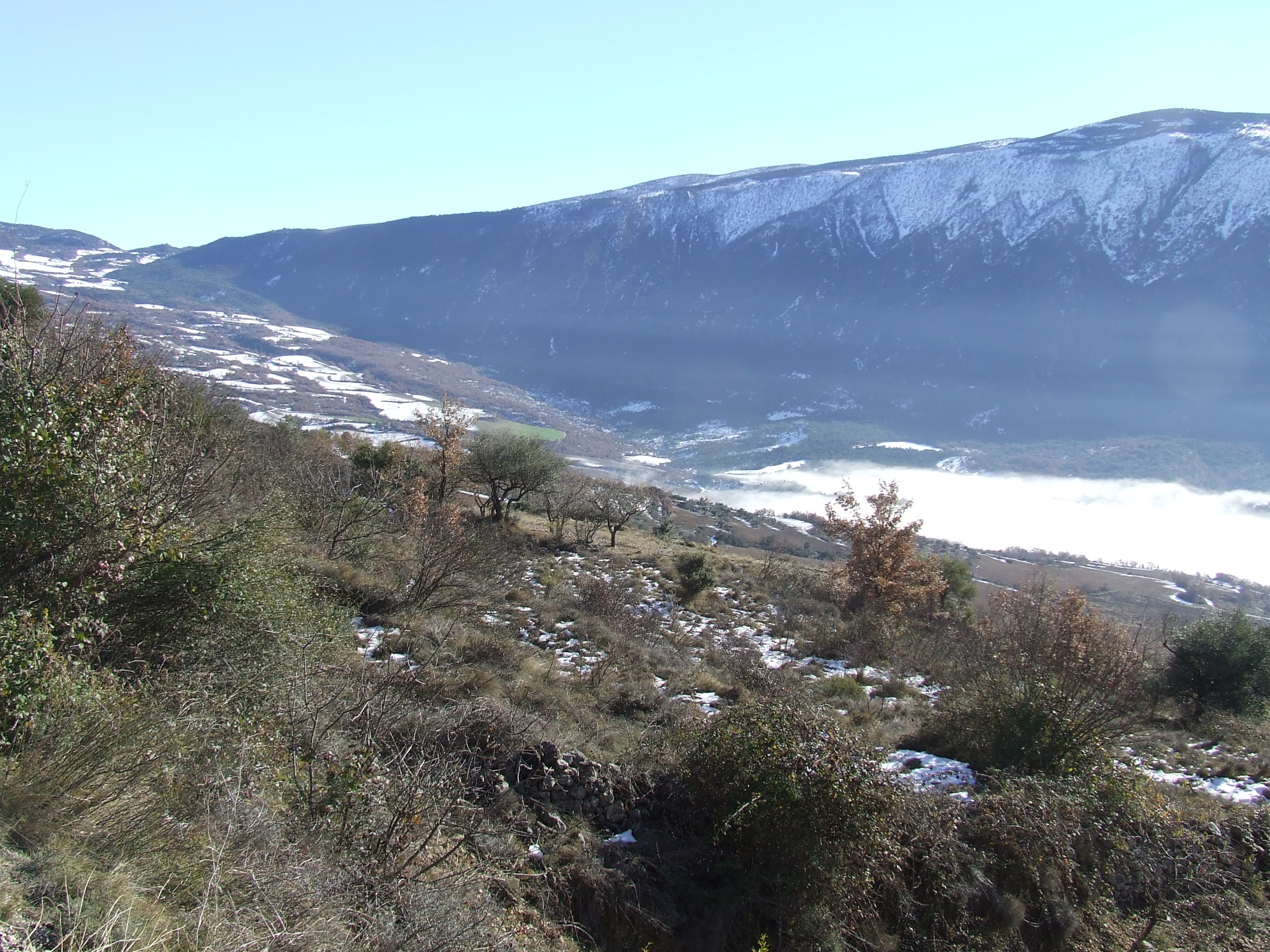 La Vall de Barcedana (Aransís, Gavet de la Conca, Pallars Jussà)